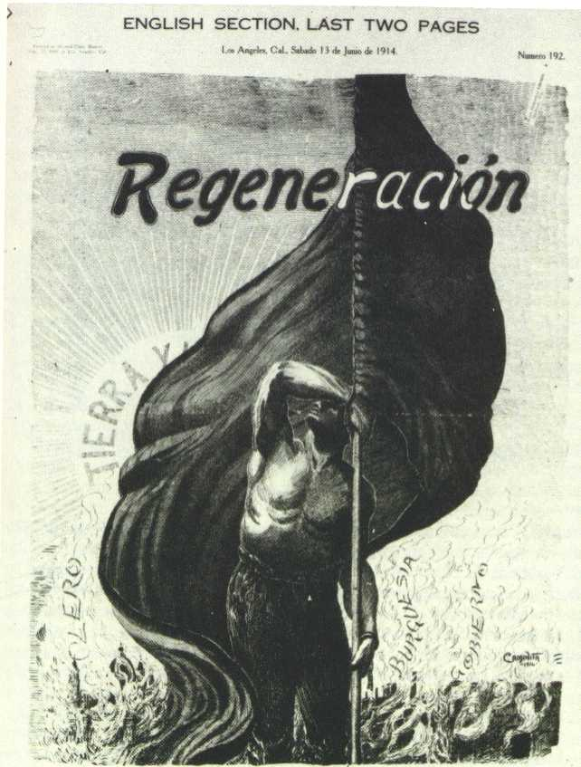 Portada del periódico Regeneración, editado por los hermanos Flores Magón, junio de l914